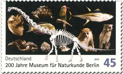 Sonderbriefmarke, 200 Jahre Museum für Naturkunde in Berlin